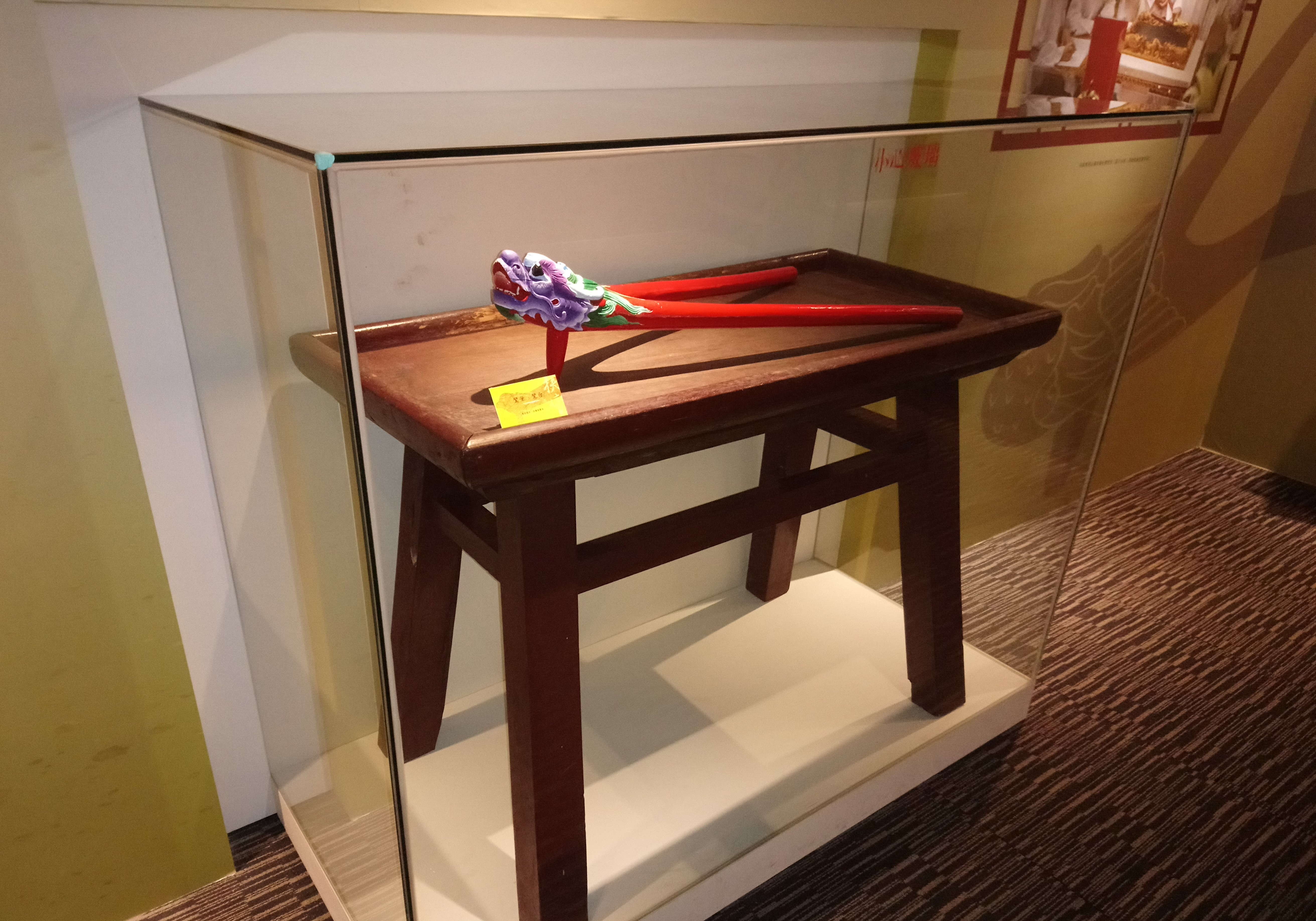 蘭陽博物館所展示的鸞臺與鸞筆,宜蘭縣頭城鎮港口里